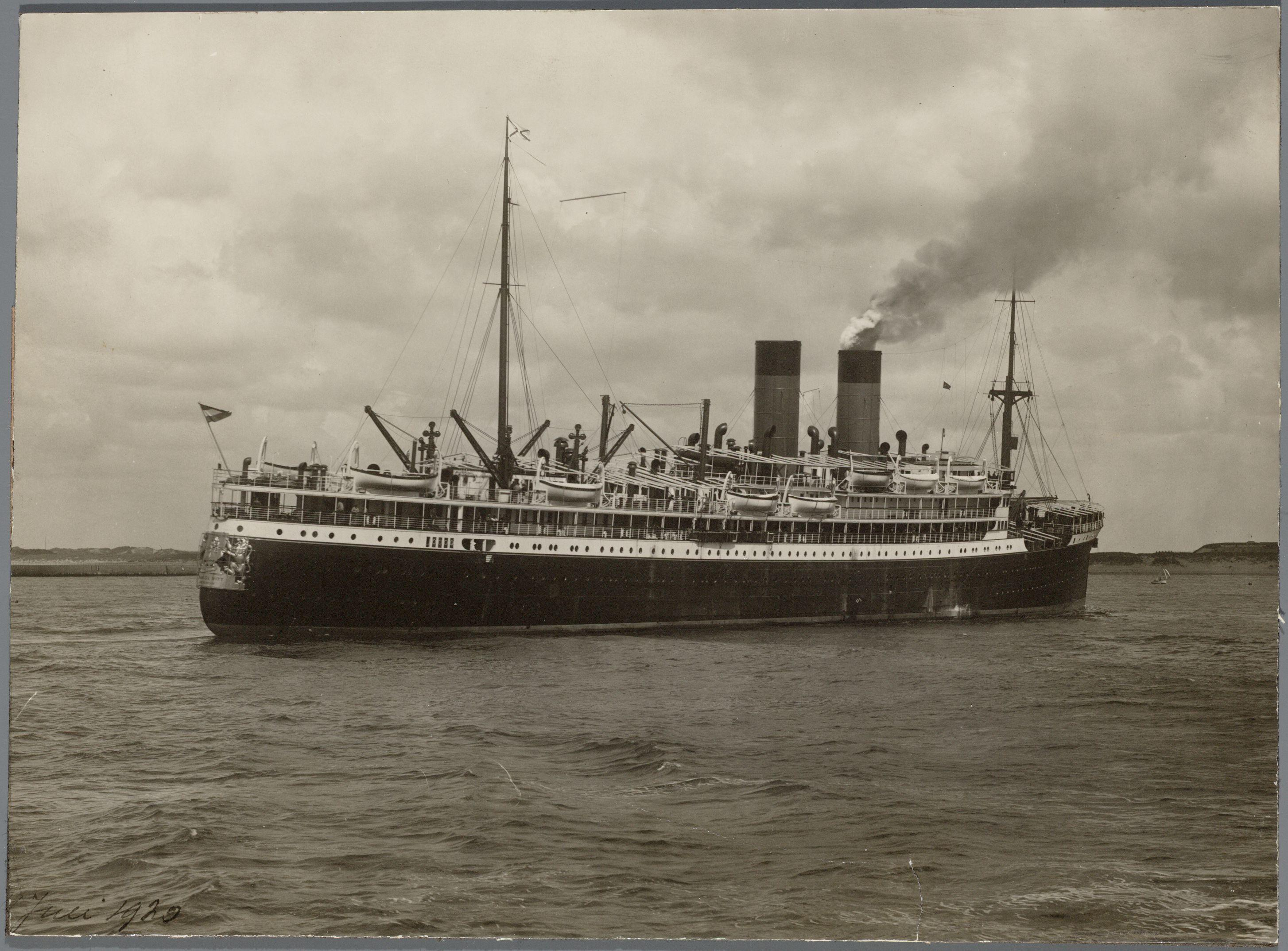 Beschrijving Het mailschip ss. Johan de Witt in de vaart Bouwnummer 150, gebouwd op de werf van de Nederlandsche Scheepsbouw Maatschappij (N.S.M.) in opdracht van de Stoomvaart Maatschappij Nederland. In 1933 is het schip bij de Amsterdamsche Droogdok Maatschappij verbouwd, verlengd en van een nieuwe boeg voorzien en is de snelheid opgevoerd van 15,5 tot 17 knopen. In december 1948 is het verkocht naar Panama en herdoopt Neptunia. Op 2 november 1957 is het nabij Cobh aan de grond gelopen. Op 2 december 1957 is het vlotgebracht en in maart 1958 te Hendrik Ido Ambacht gesloopt. Documenttype foto Vervaardiger Onbekend Anoniem Collectie Archief Nederlandse Dok- en Scheepsbouw Mij.: foto's Datering 27 juli 1920 Inventarissen Afbeeldingsbestand 010179000250